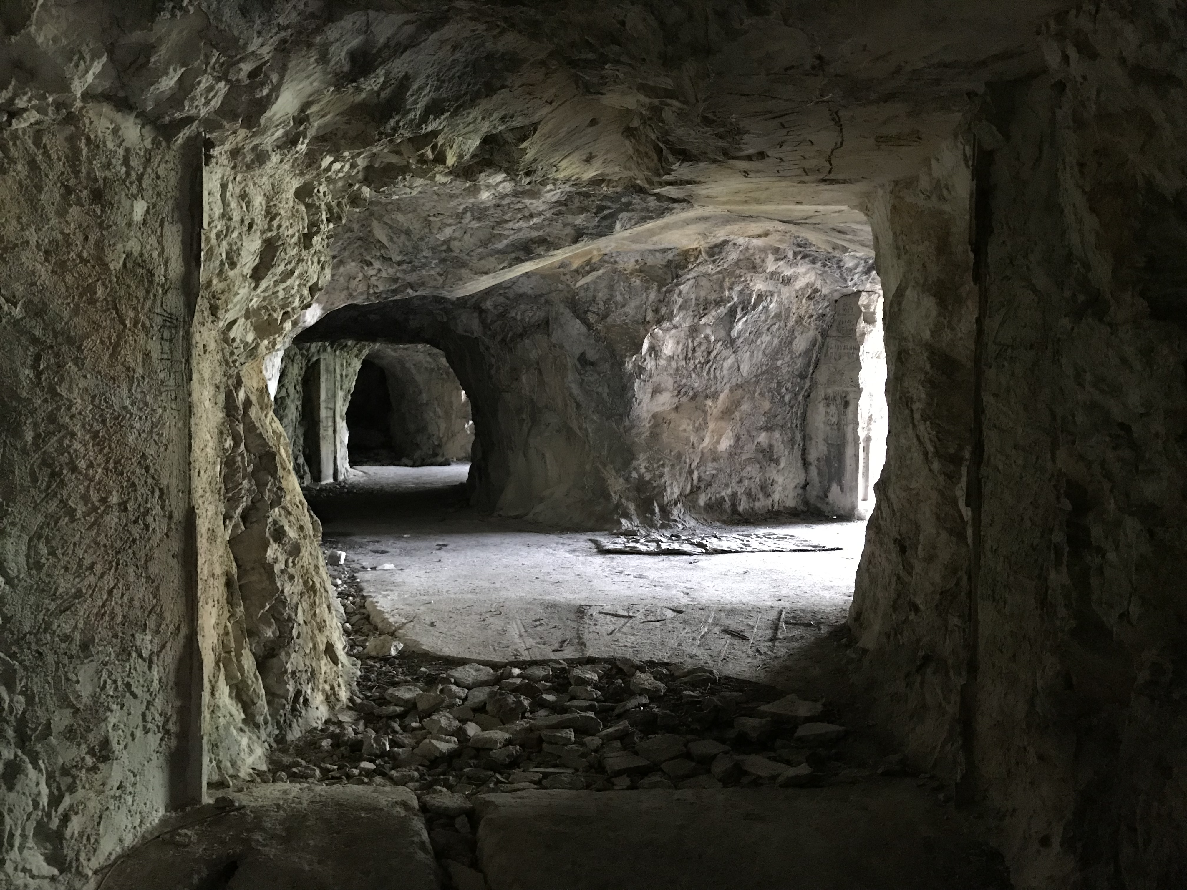 Fortificazione in caverna sul Monte Celva (TN)